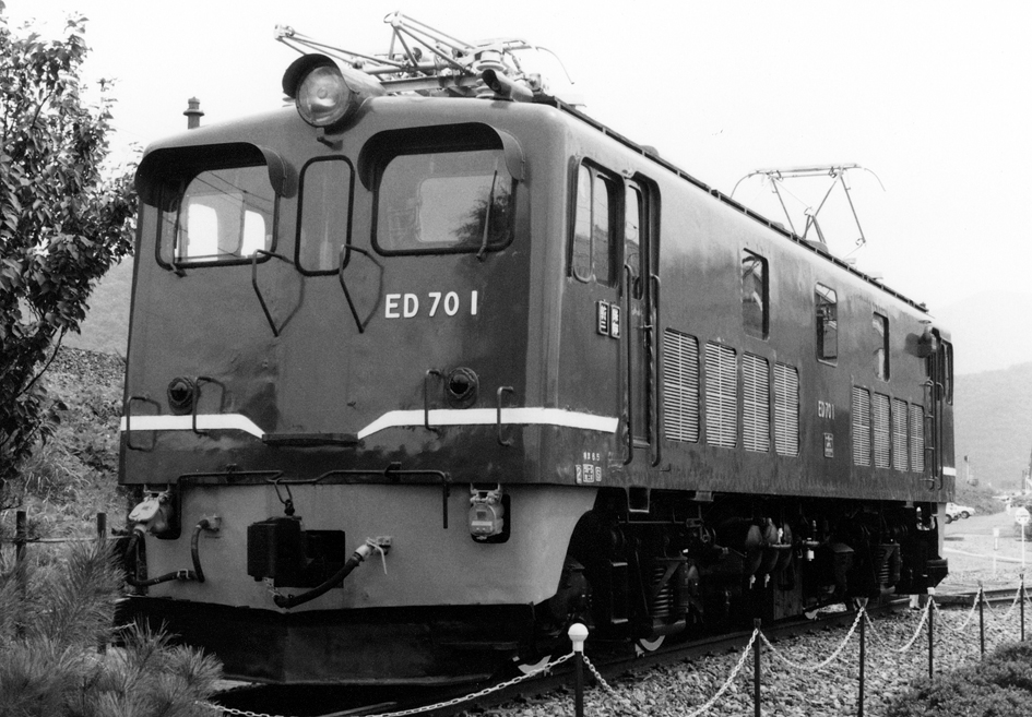 国鉄 ED70 1